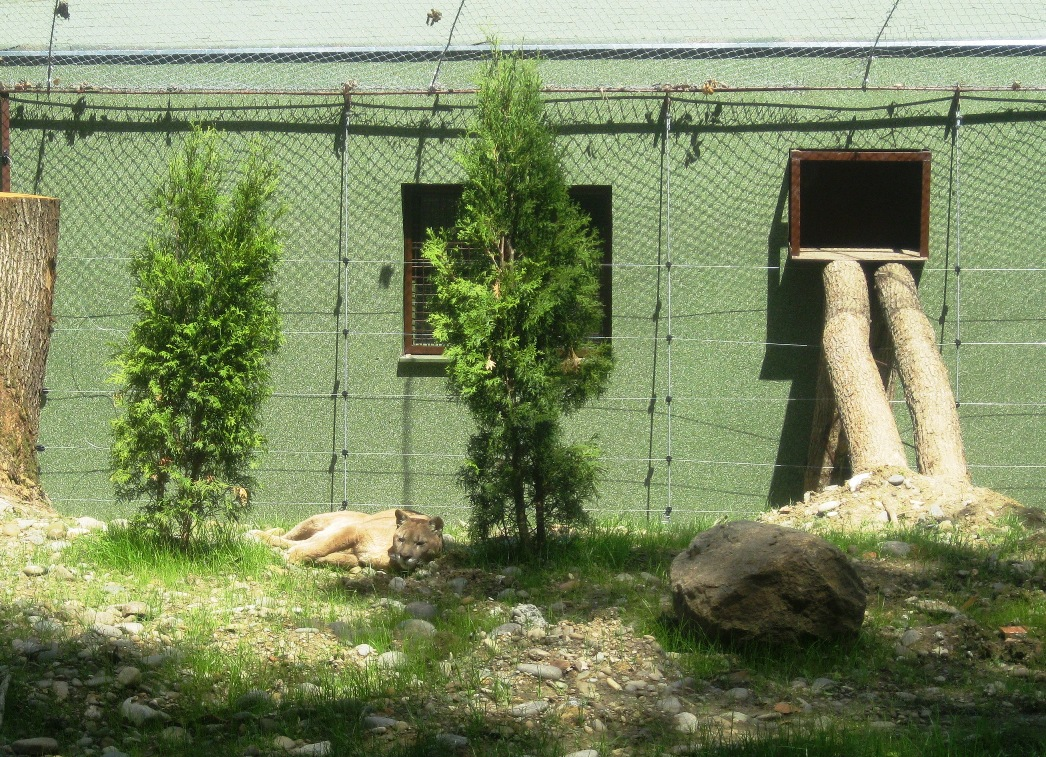 A marosvásárhelyi állatkert